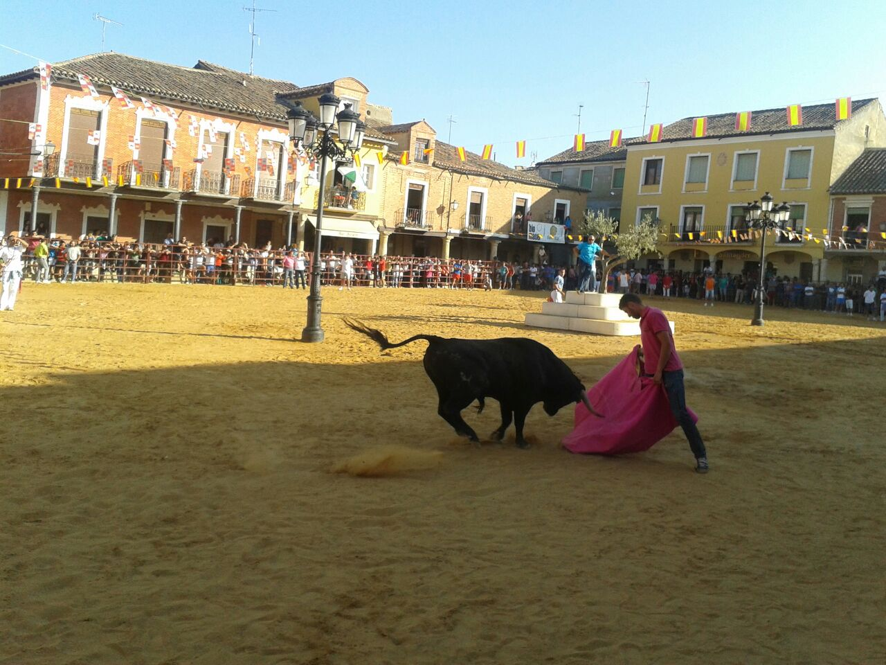 Un mozo torea durante uno de los encierros en la plaza Mayor de Villalpando, durante las Fiestas de San Roque 2014.